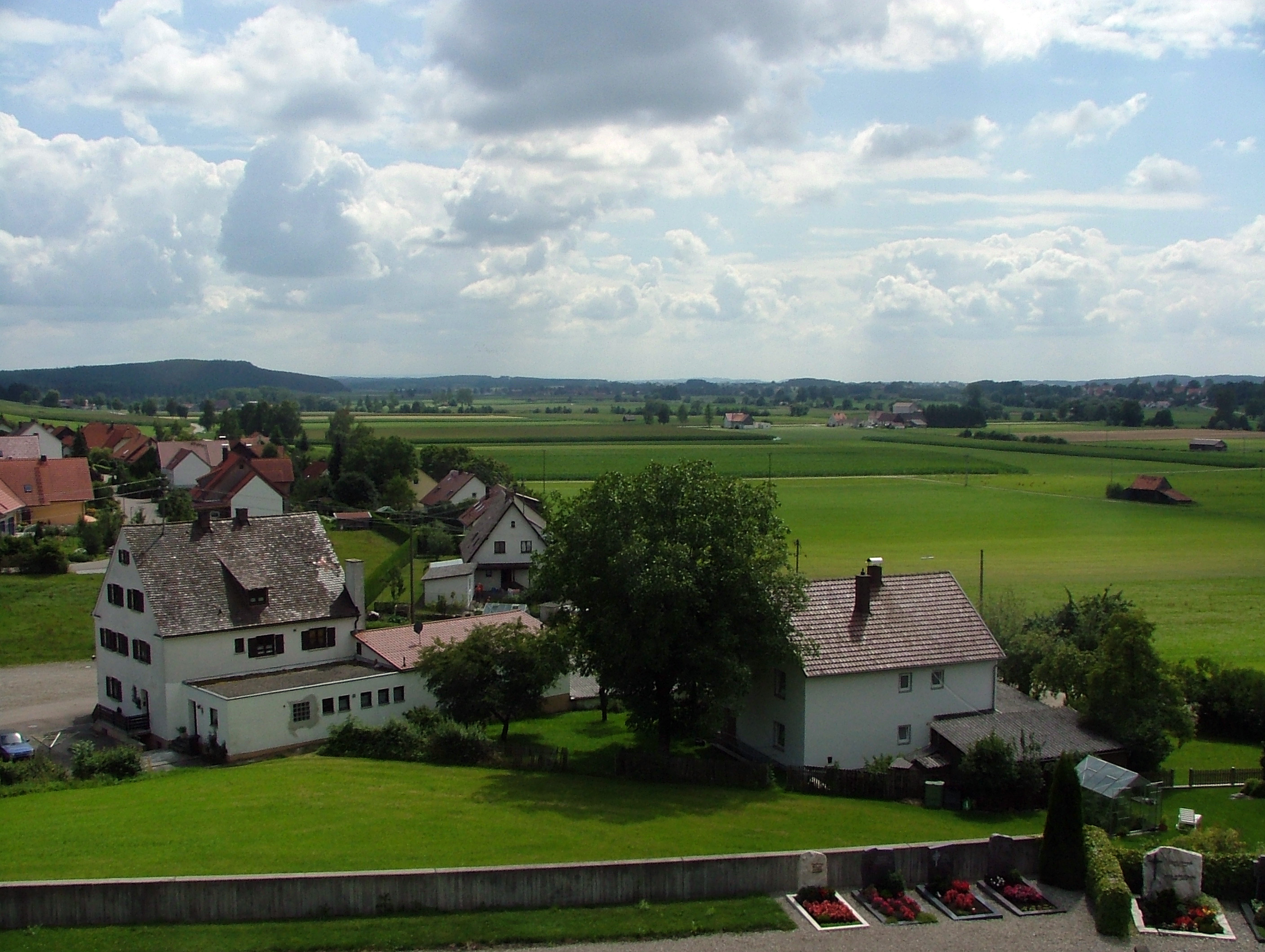 Günztal